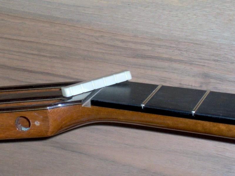 Classical guitar nut